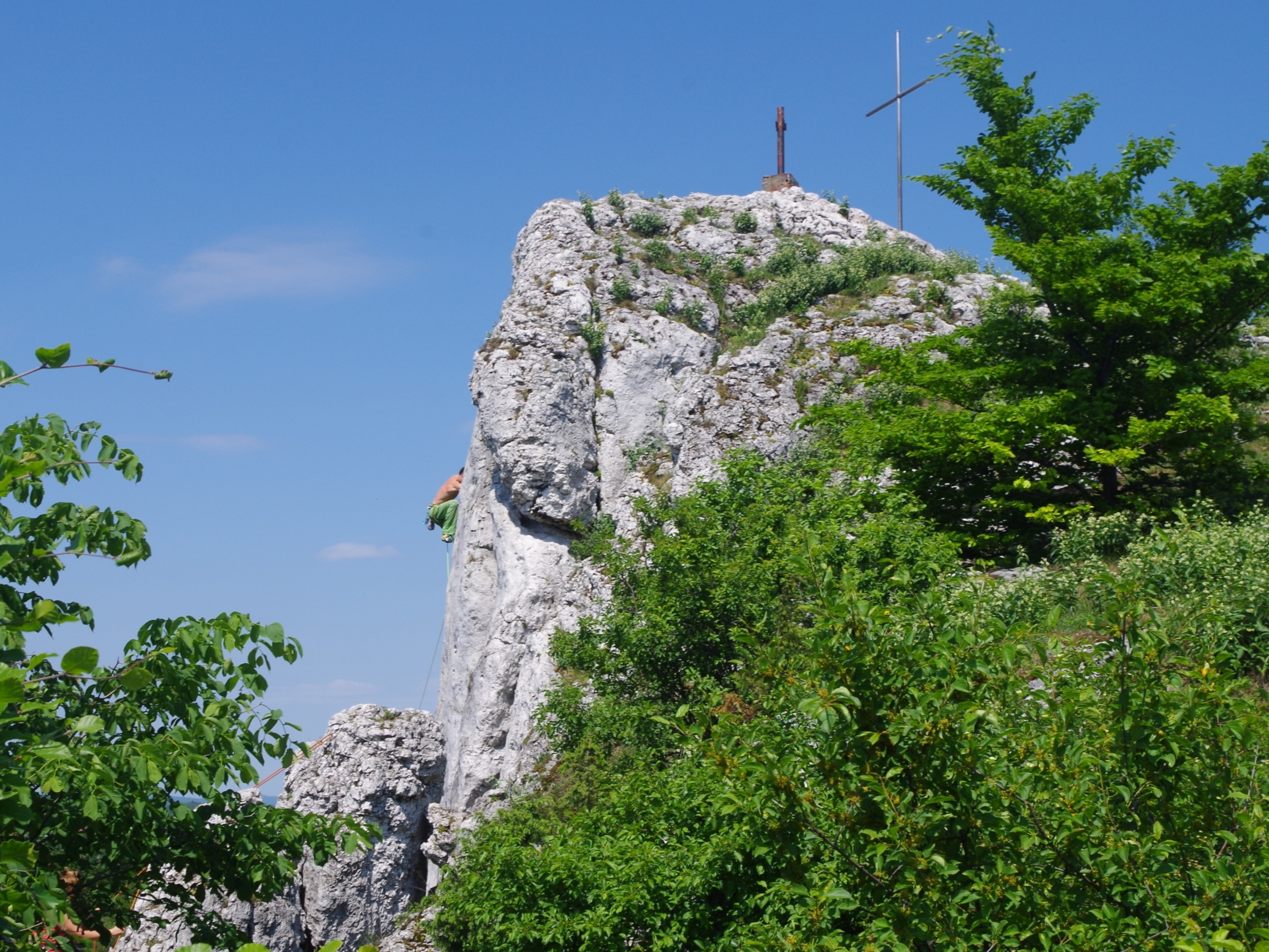 Skała Słoń na Wielkim Grochowcu w Ryczowie